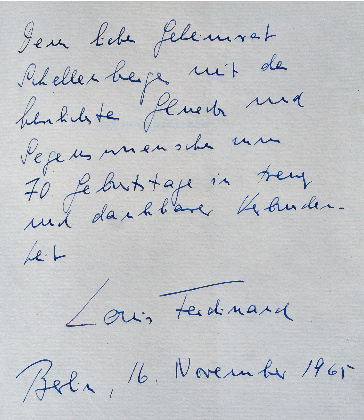 Geburtstagsgruß/Widmung von Louis Ferdinand von Preußen an den Geheimrat Kurt Oswald Reinhold Schellenberger (1895-1977) in dem Buch „Die Hohenzollern. Ein Bildwerk von Anton Ritthalter. Frankfurt, Bonn. 1961“. Text: Dem lieben Geheimrat Schellenberger mit den herzlichsten Gluecks und Segenswuenschen zum 70. Geburtstag in treuer und dankbarer Verbundenheit. Loius Ferdinand Berlin, 16. November 1965